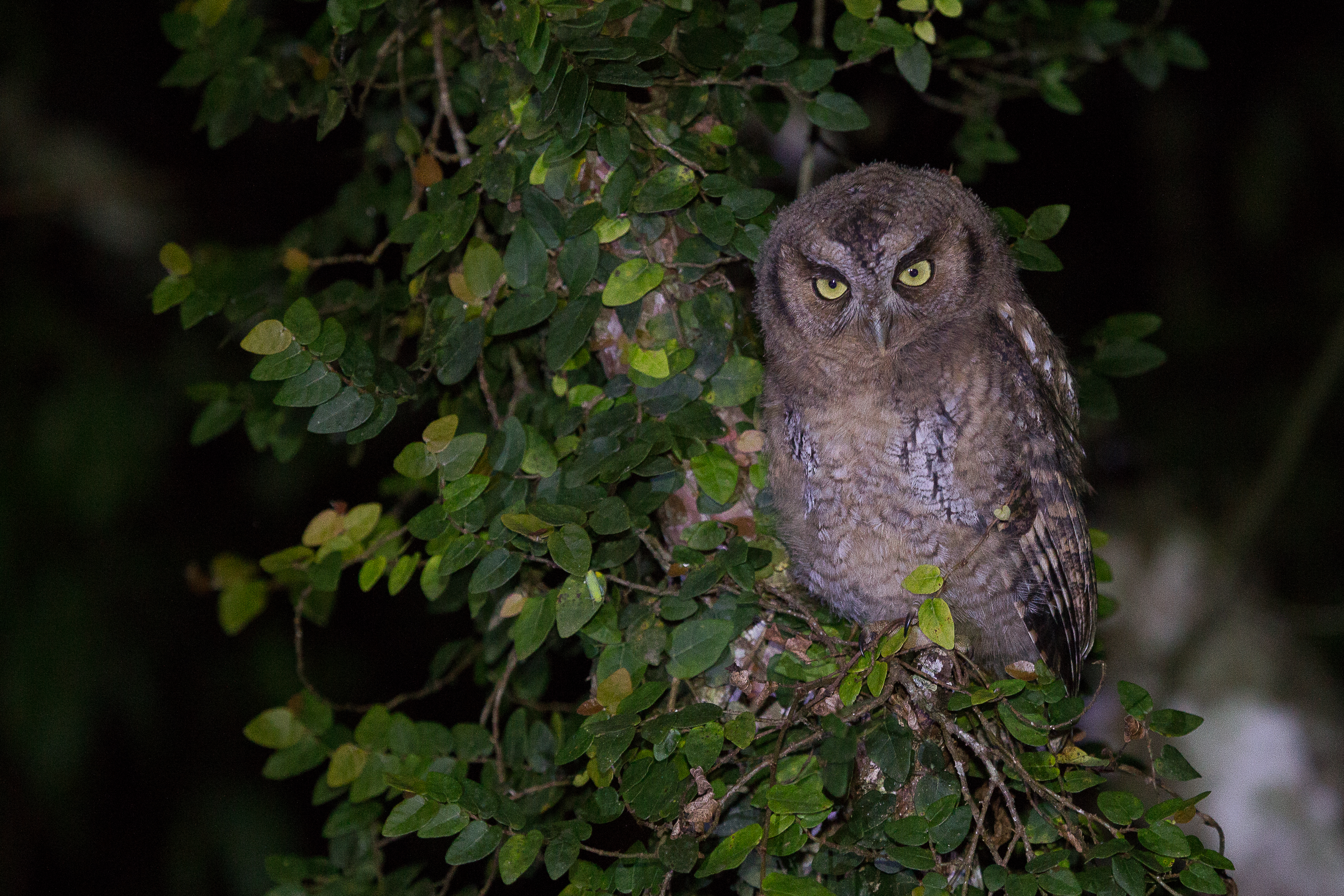 Filhote de corujinha-do-mato no Parque Estadual Intervales